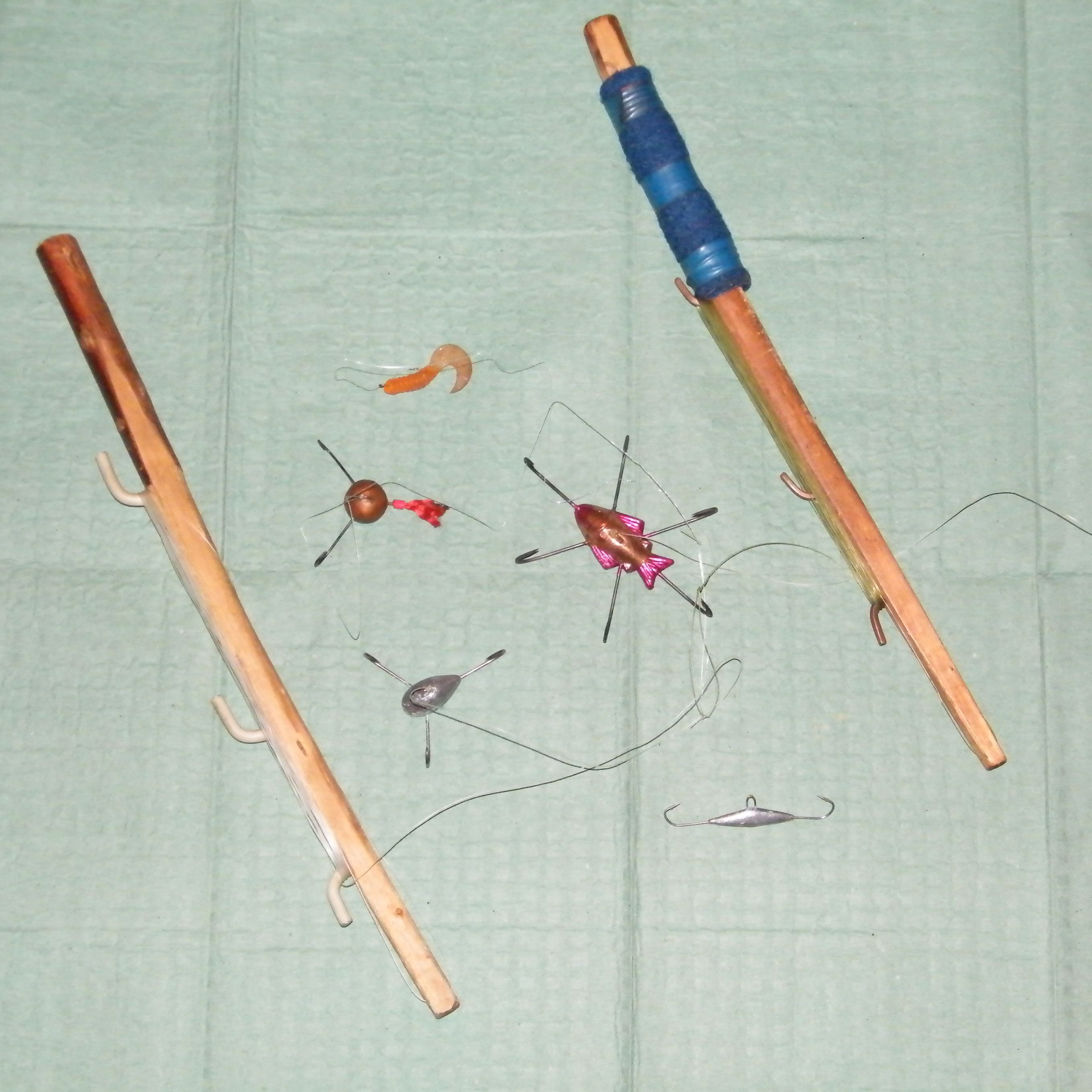 Удочки для зимней рыбалки (отвесное блеснение)